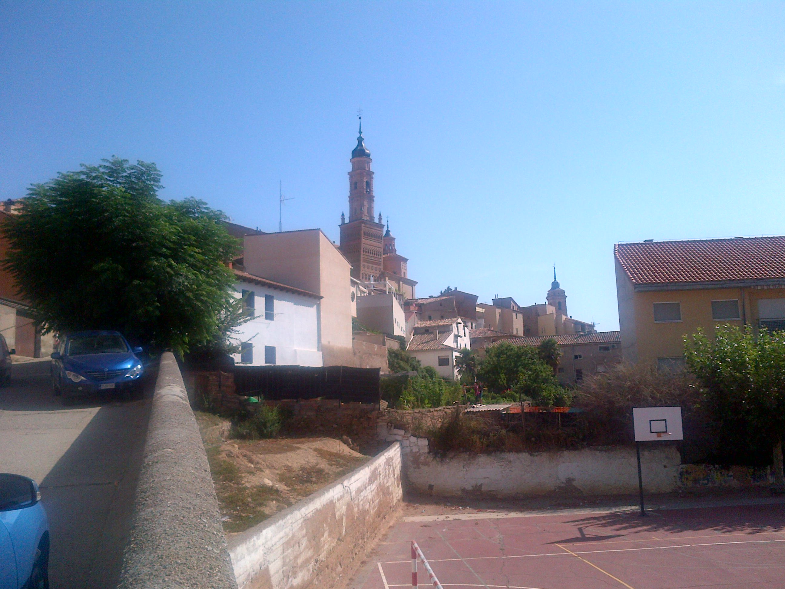 Torre de Santa María de Ateca